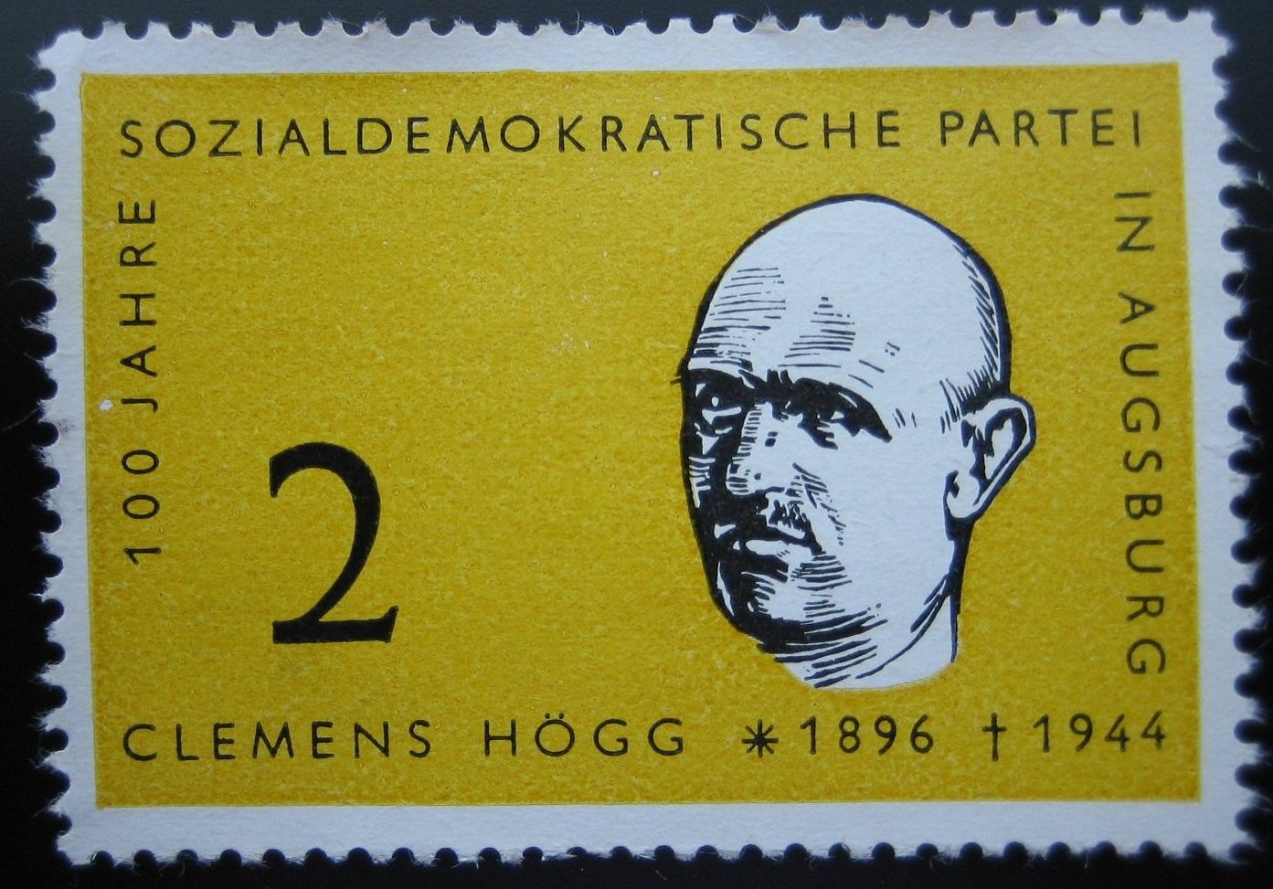 Bildnis Clemens Högg, im Nationalsozialismus getötet, auf Spendenmarke der Augsburger SPD